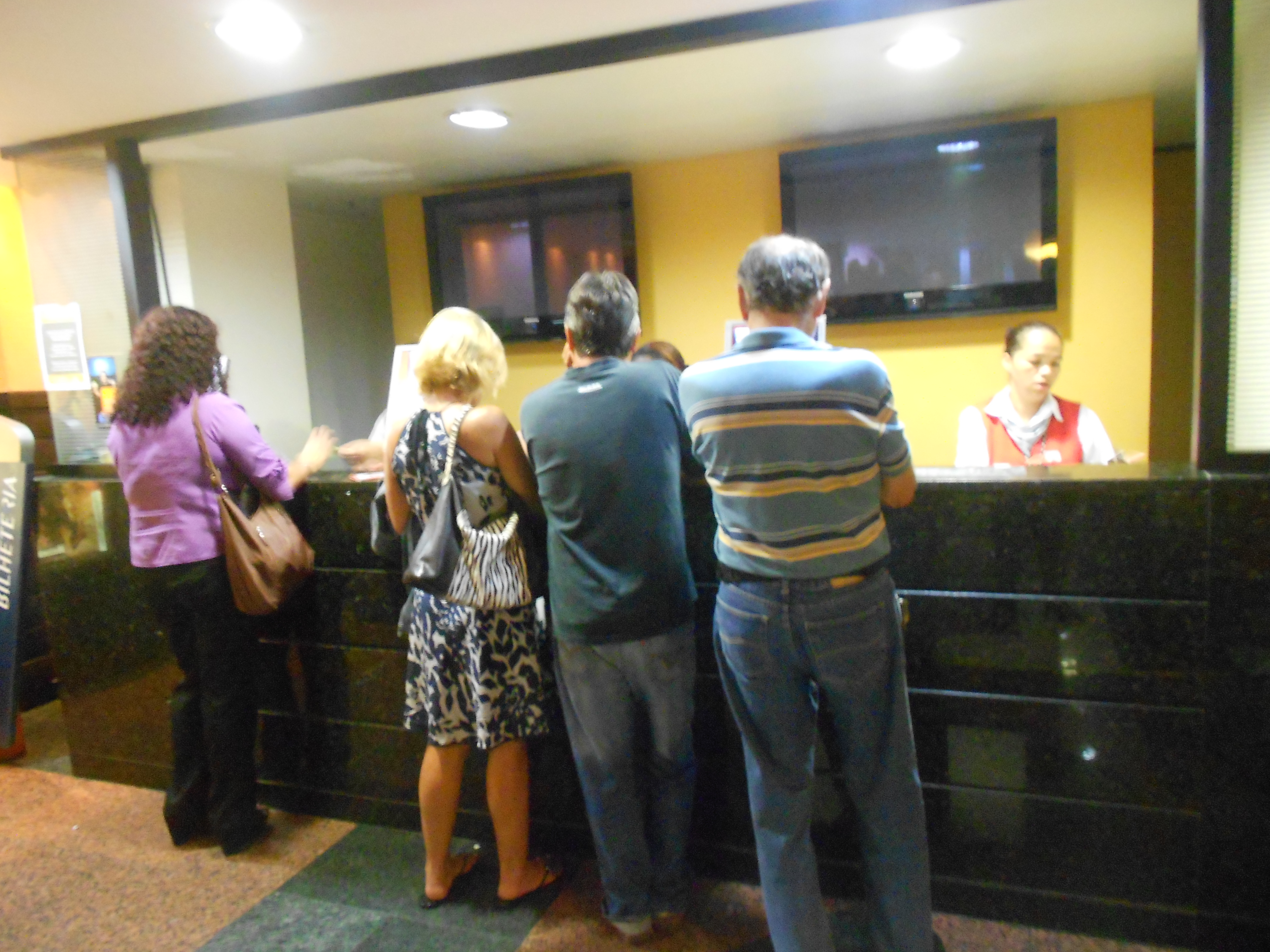 Bilheteria do Cine São Luiz, na antiga Galeria São Luiz, atual Espaço Kinoplex, situado na Rua do Catete, 311, numa área compreendida entre Catete e Largo do Machado, Rio de Janeiro, Brasil.